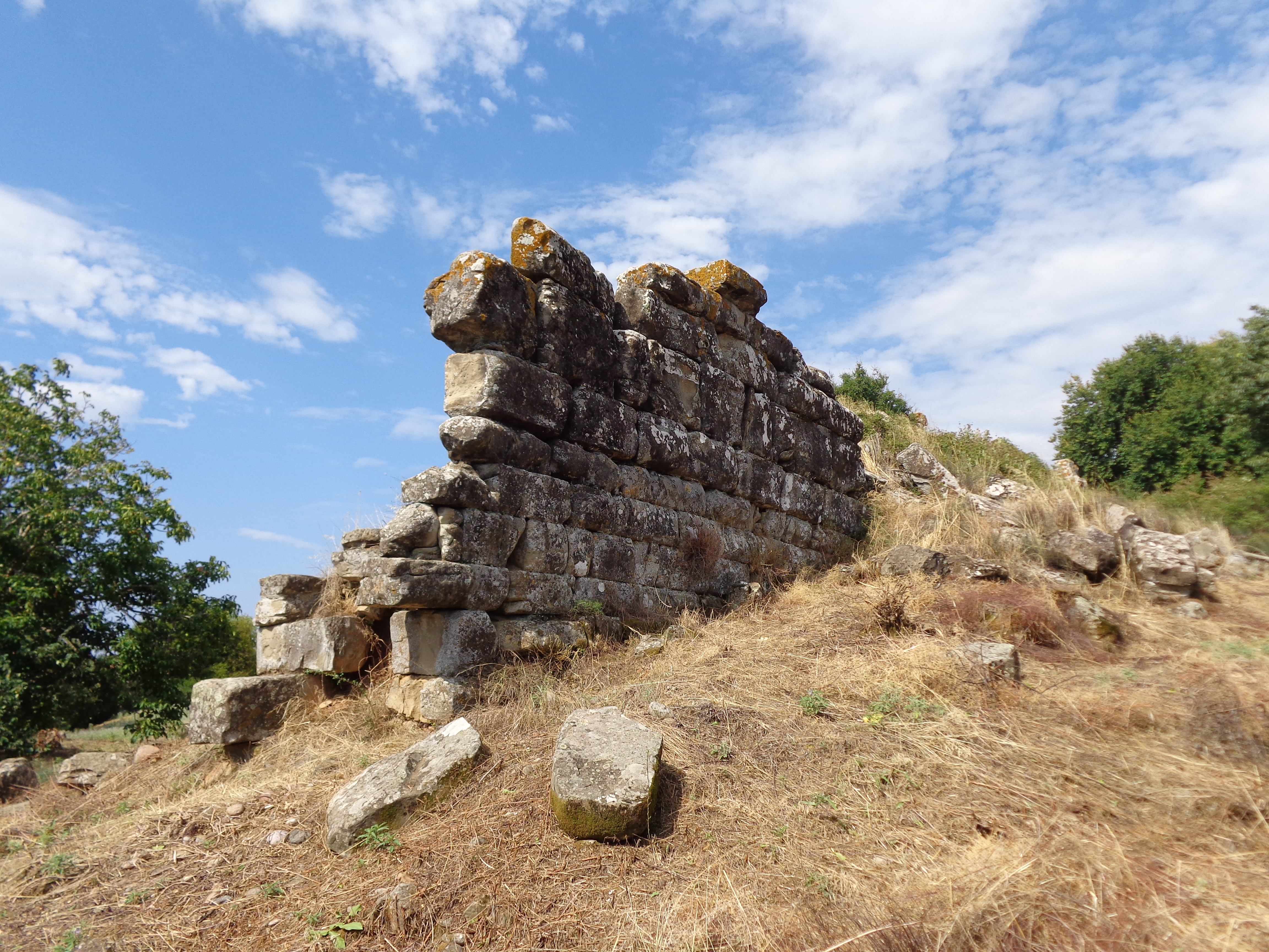 Στράτος«Στράτος»